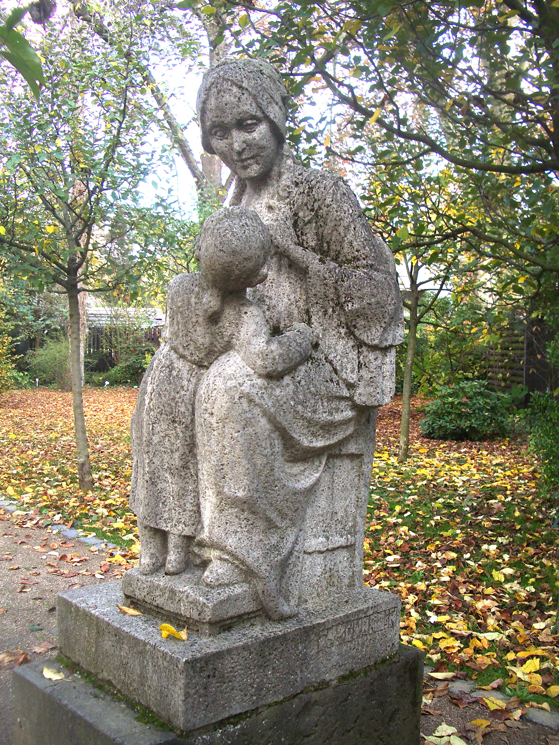 Frankfurt am Main, Palmengarten, Denkmal für die Mutter Goethes (Catharina Elisabeth Goethe)